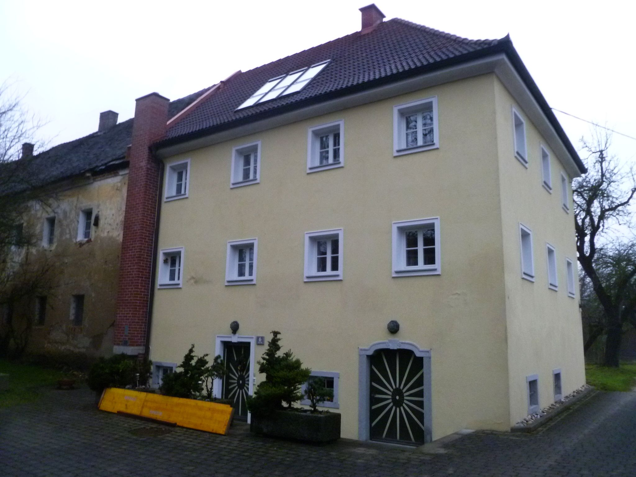 Schloss Stein bei St. Marien (teilrenovieter_Meierhof)